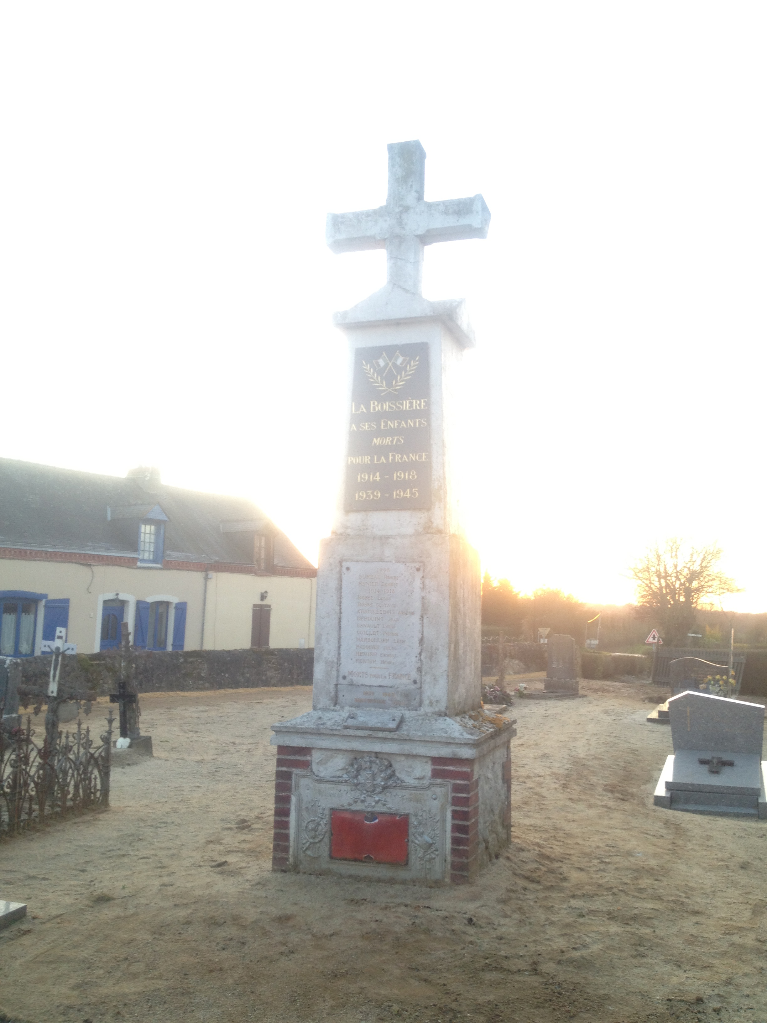 Mayenne, France